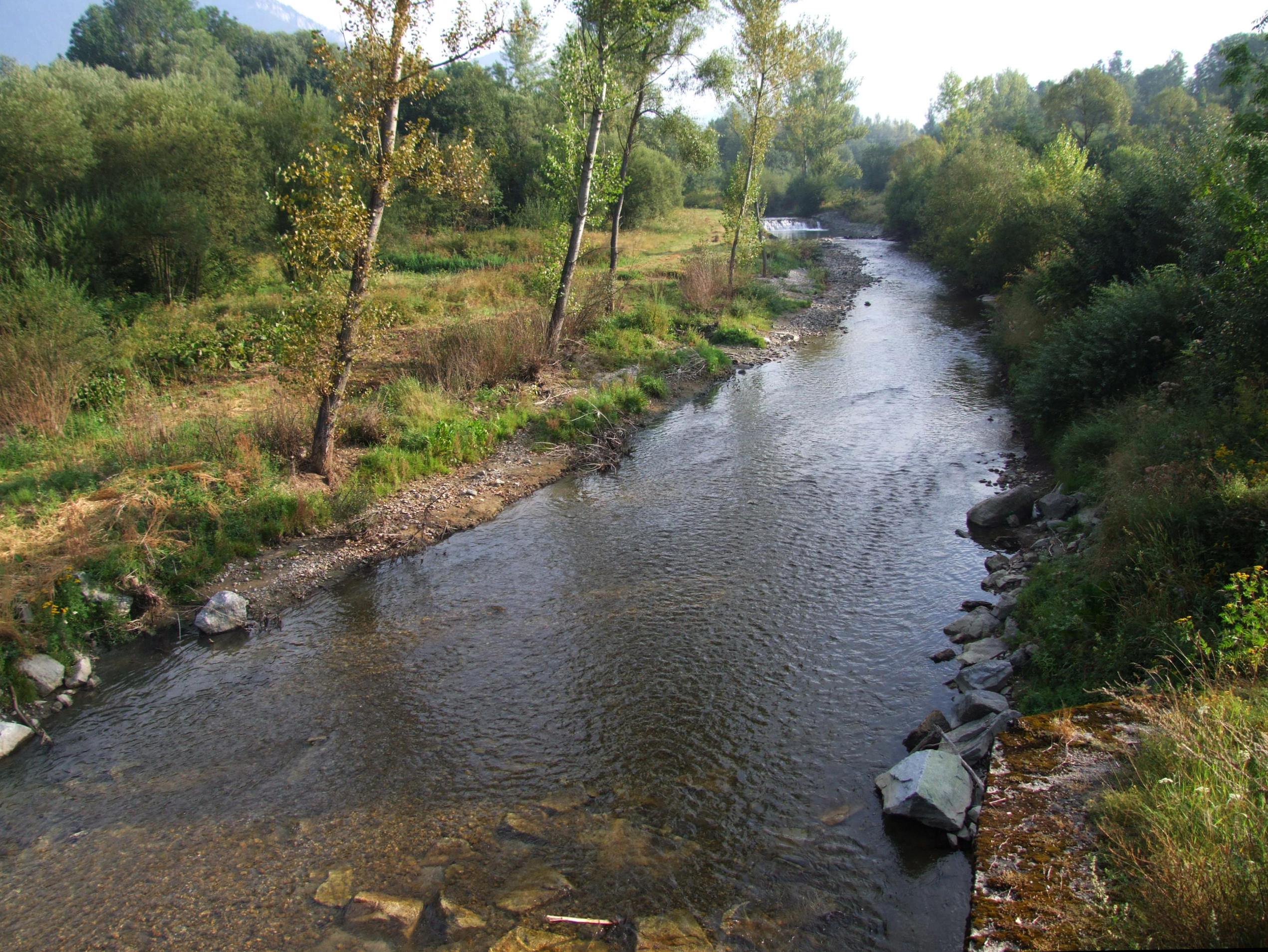 Kwaczanka w Brnicach (Liptowska Sielnica), przed ujściem do Liptowskiego Jeziora